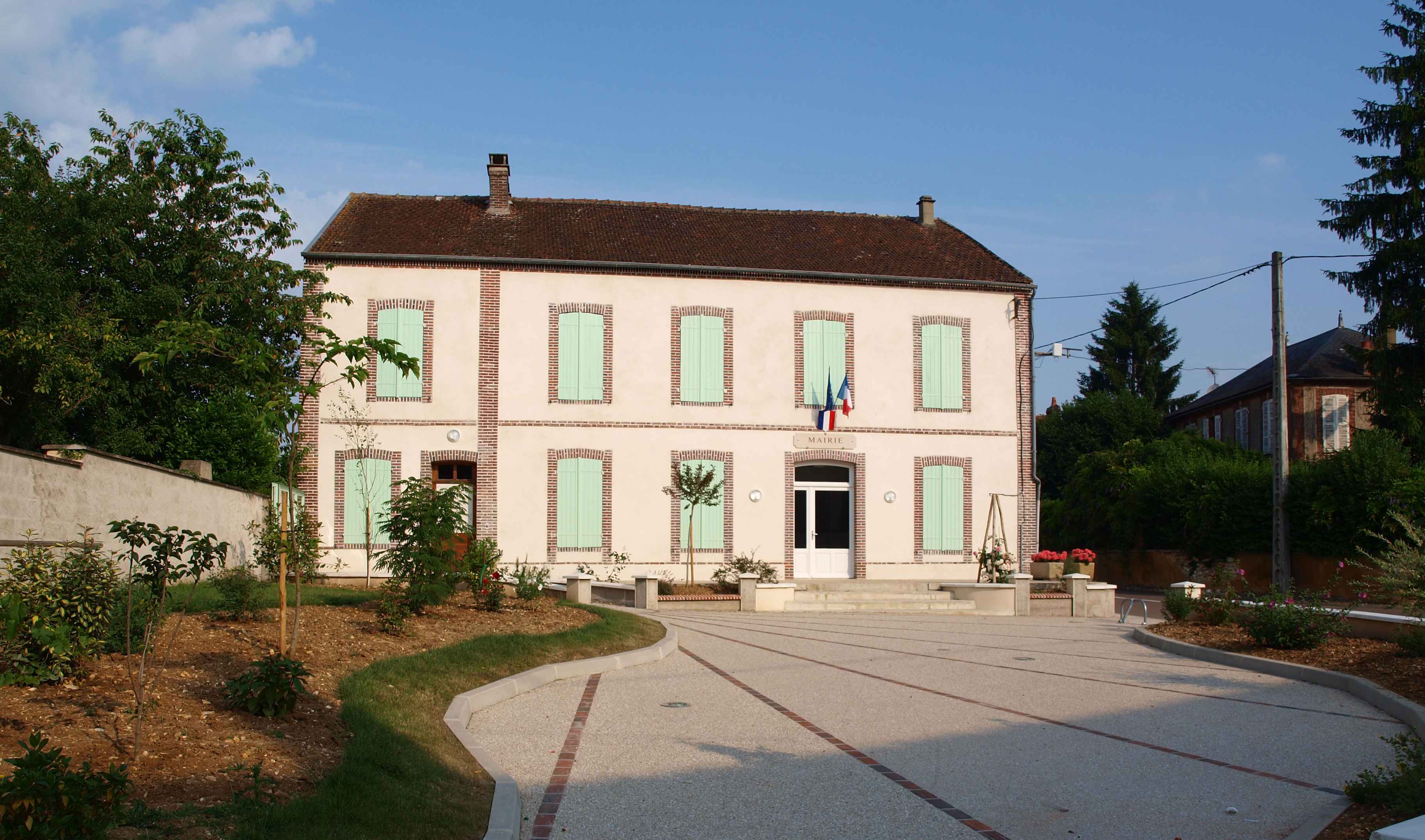 Chamvres (Yonne, France) , mairie.